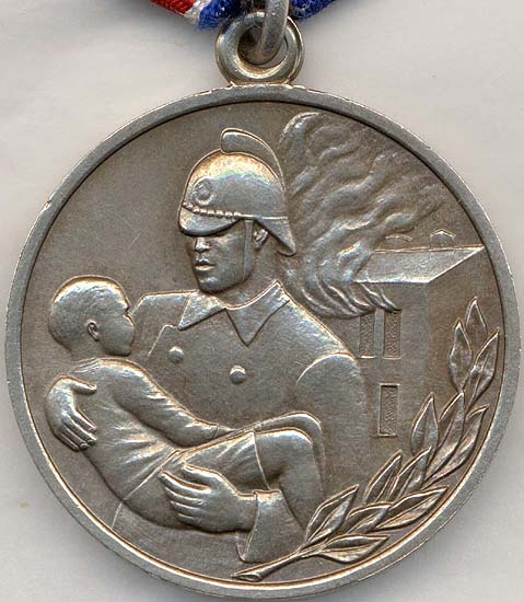 Медаль «За отвагу на пожаре». Обратная сторона